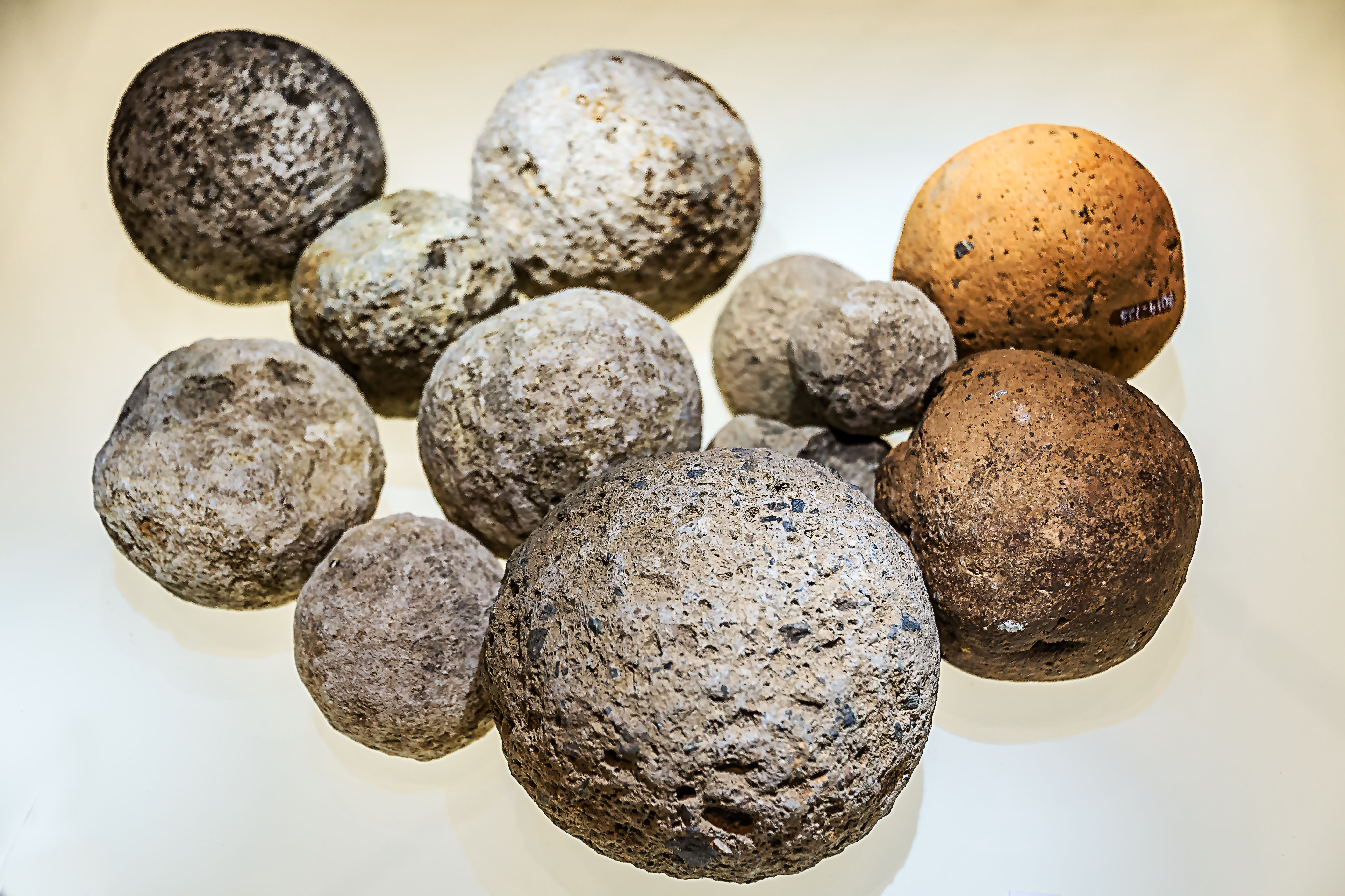 Kugeln aus Stein und gebrannten Ton, die von einem römischen Torsionsgeschütz (Palintona) abgeschossen wurden. Ausgestellt in der Festung Ehrenbreitstein In Koblenz (Leihgaben des Museums Het Valkhof, Nijmegen und dem Landesmuseum Bonn)